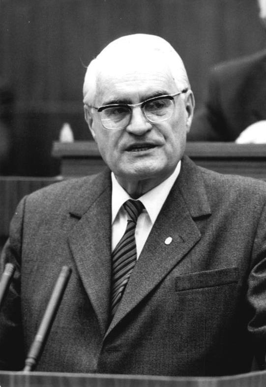 ADN-ZB Settnik 8.6.1989 Berlin: Volkskammer Gerald Götting, Stellvertreter des Präsidenten der Volkskammer, ergriff das Wort zur 9. Tagung der Volkskammer der DDR.